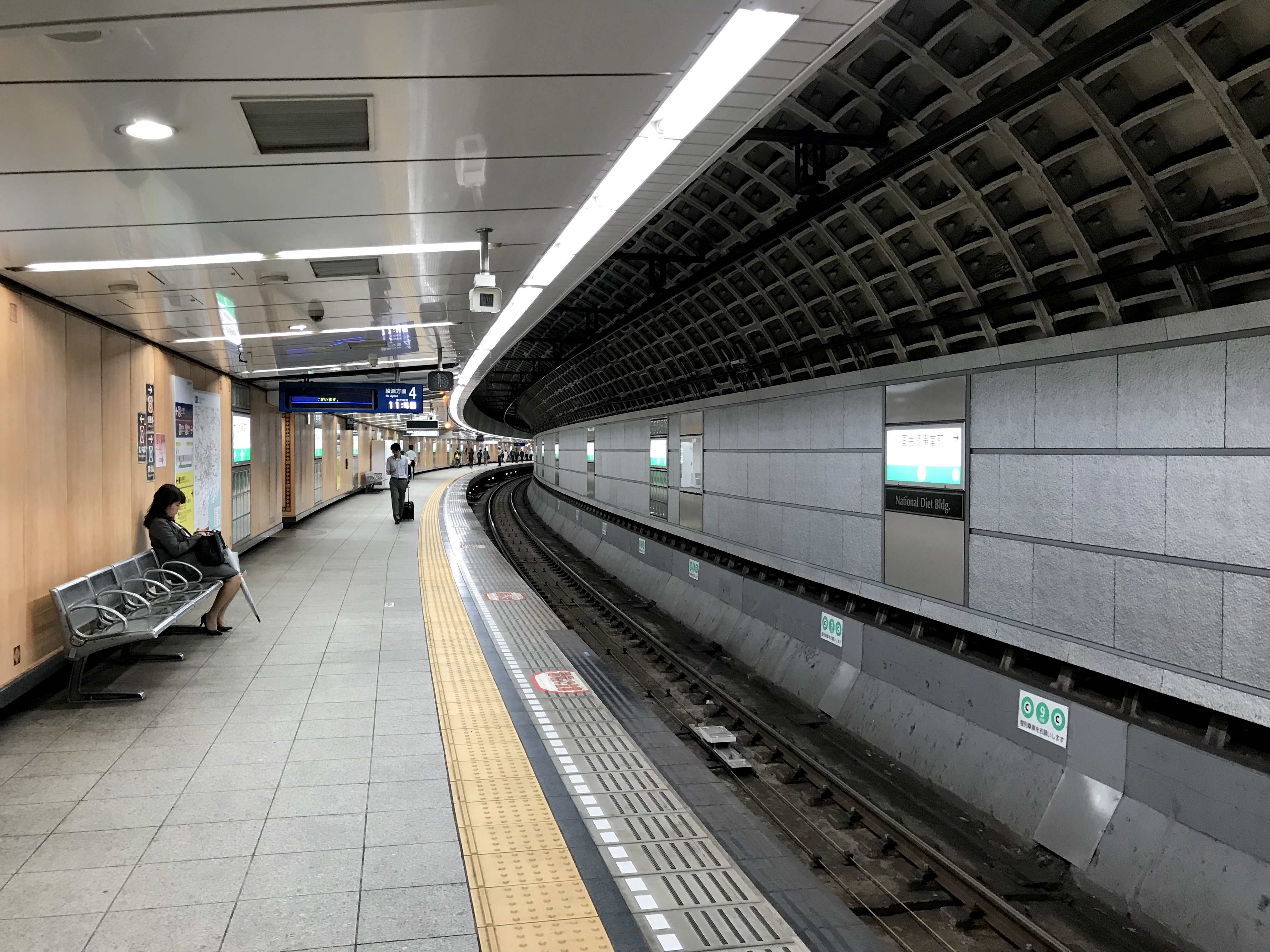 東京メトロ千代田線国会議事堂前駅ホーム